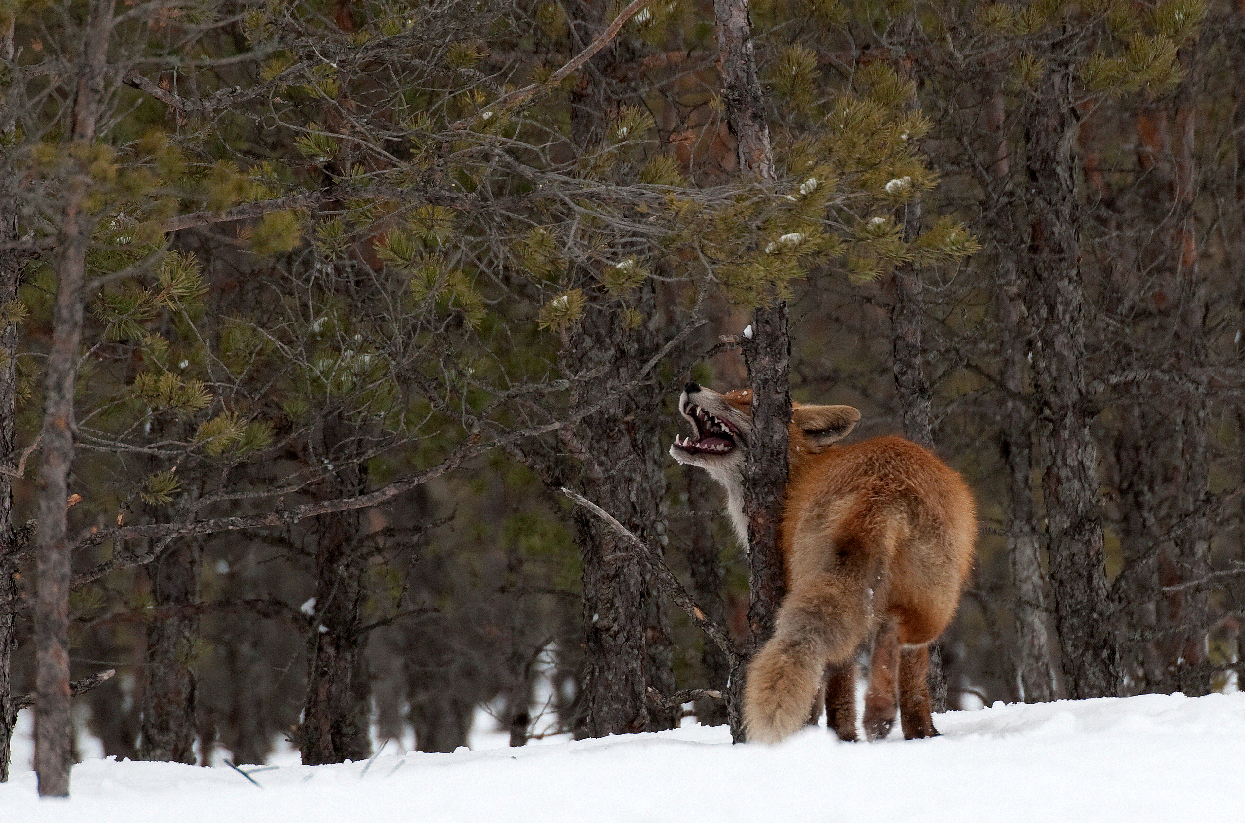 Rebane on ka kuulus selle poolest, et kui ta satub olukorda, kus saakloomadel ja -lindudel puudub põgenemise võimalus, siis murrab ta maha kõik loomad ja linnud, kelle kätte saab. Selle käitumise tulemusena arvatakse, et rebane on kuri ja kättemaksuhimuline, kuid tegelikult on murdmise põhjuseks rebase jaoks ebaloomulik olukord, kus saakloomad ei suuda ta eest ära joosta (sellist olukorda looduses ei juhtu ja seetõttu pole rebane kohastunud vastavalt käituma)Foto on üles võetud Tartumaal, Ilmatsalus aastal 2011.